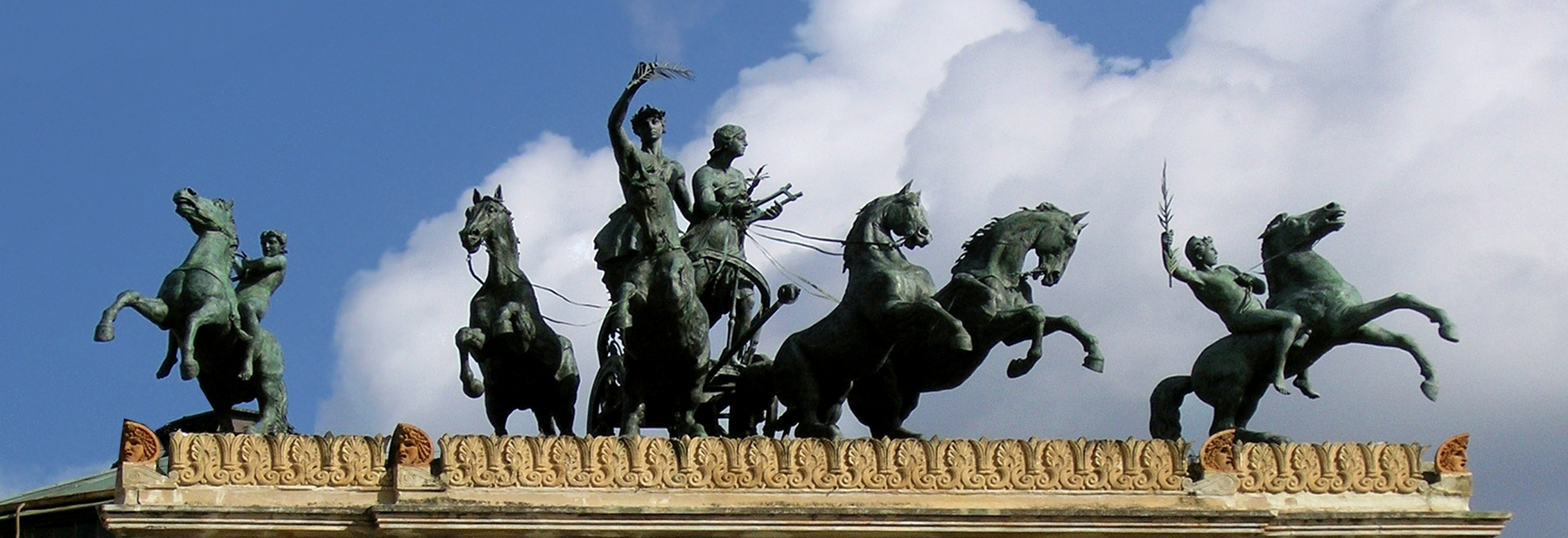 Sicilianu: Palermo, Tiatru Politeama